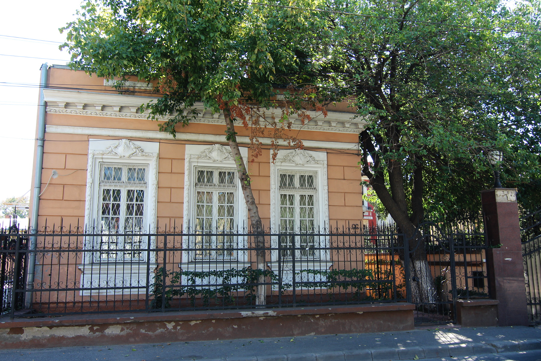 Casă pe Calea Călărașilor